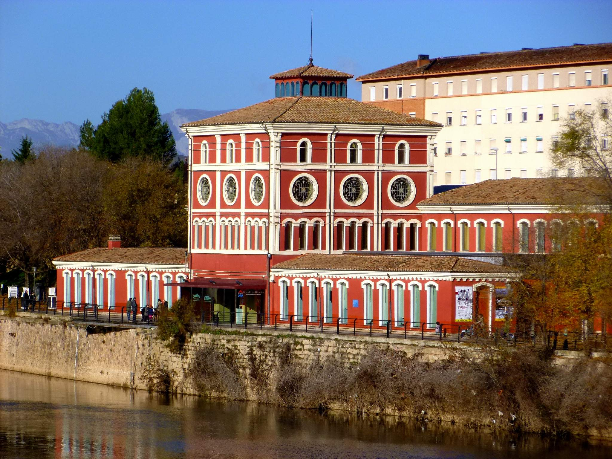 Casa de las Ciencias (Logroño)